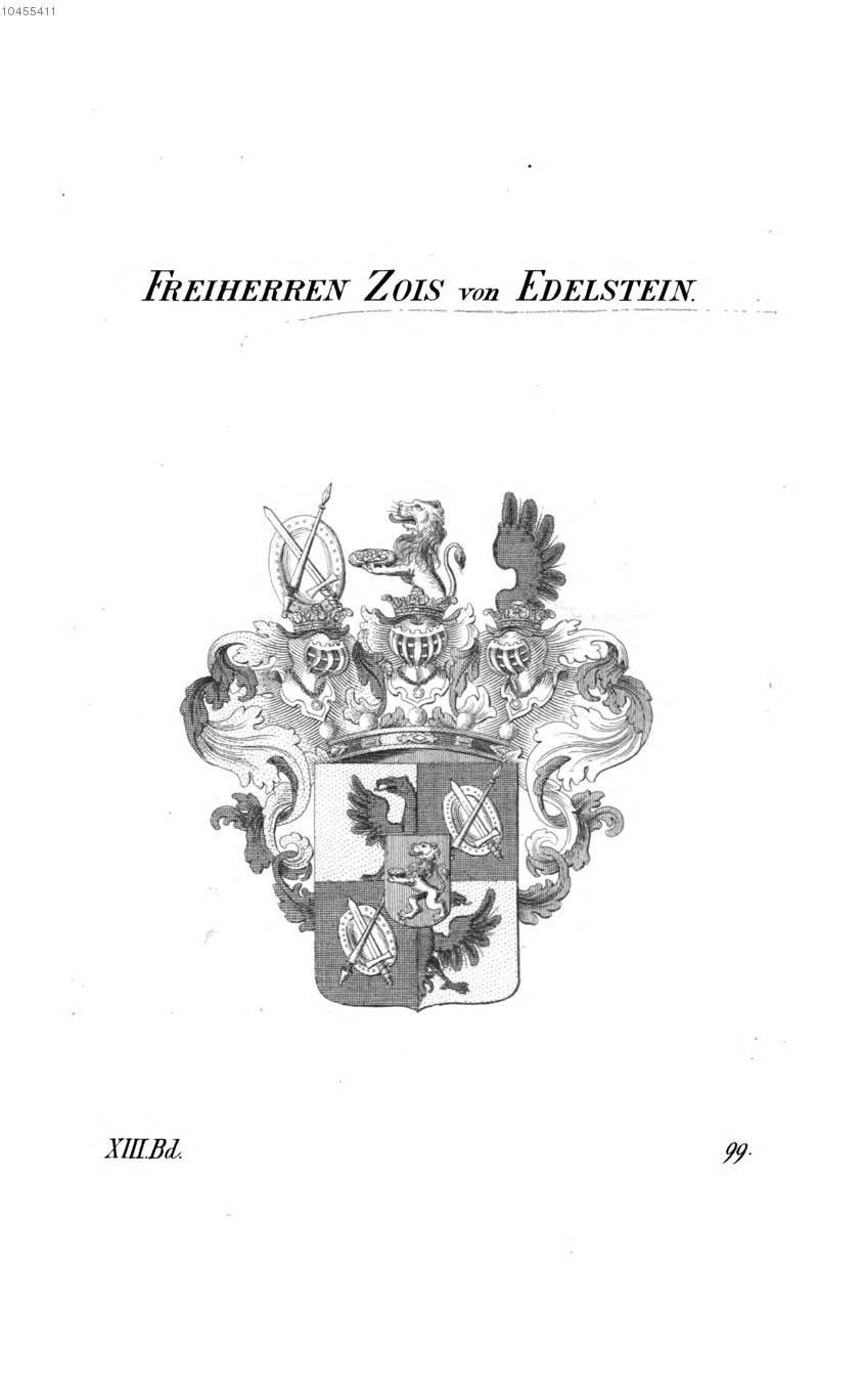 Wappen Zois von Edelstein - Tyroff AT.jpg